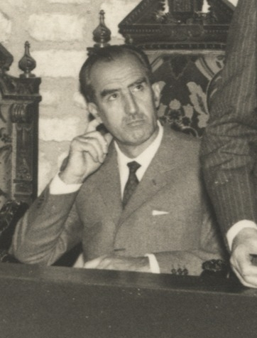 Título original: Época del alcalde Pedro Aguinagalde : toma de posesión de Pedro Aguinagalde junto al Gobernador Civil de Gipuzkoa Manuel Valencia Remón. Gipuzkoa Fernández de Casadevante, José Ramón Valencia Remón, Manuel Aguinagalde Oyarzabal, Pedro Positivo 18 x 12 cm B/N Localización: Hondarribia